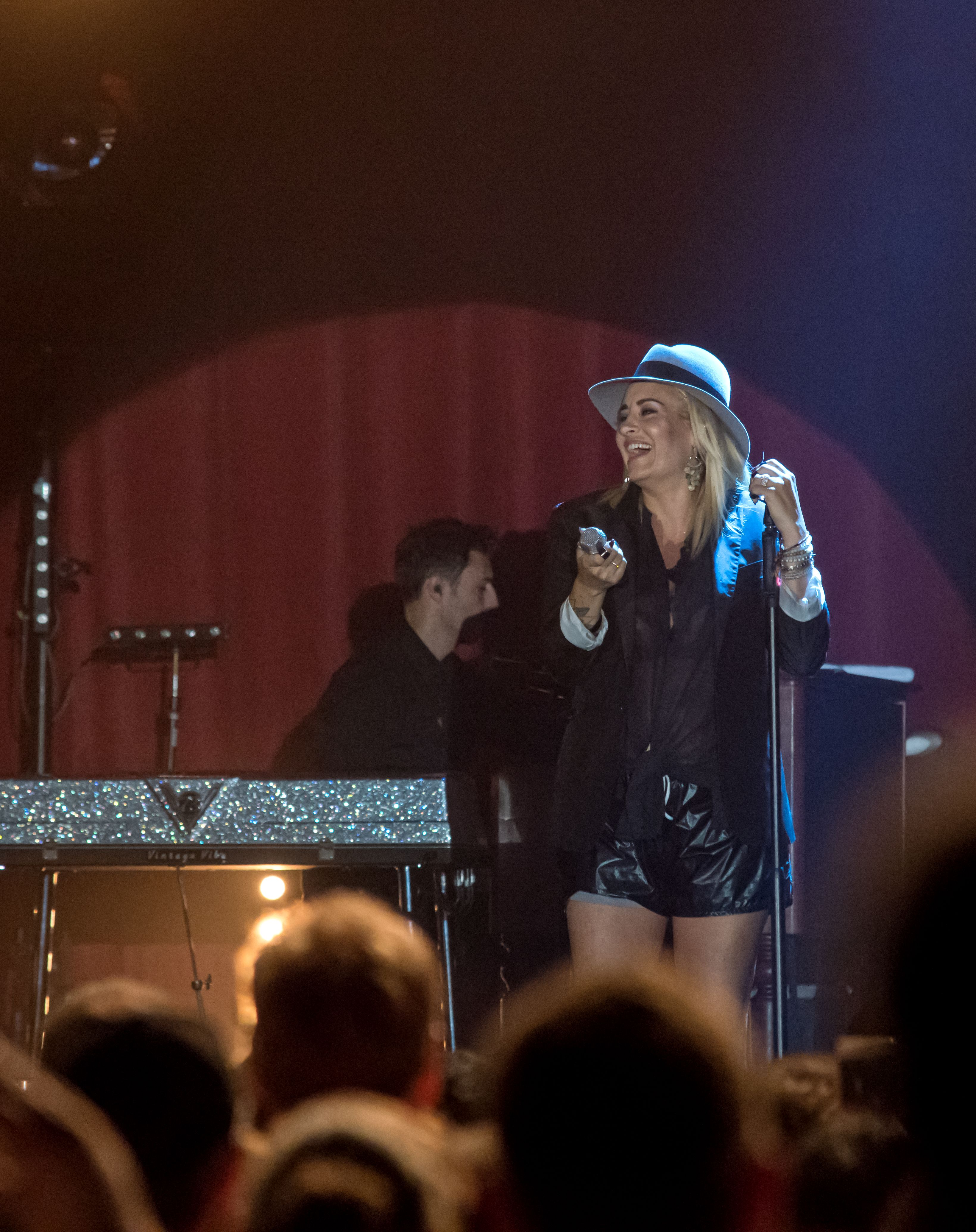 Bilder vom Zelt Musik Festival 2016 in Freiburg im Breisgau Sarah Connor